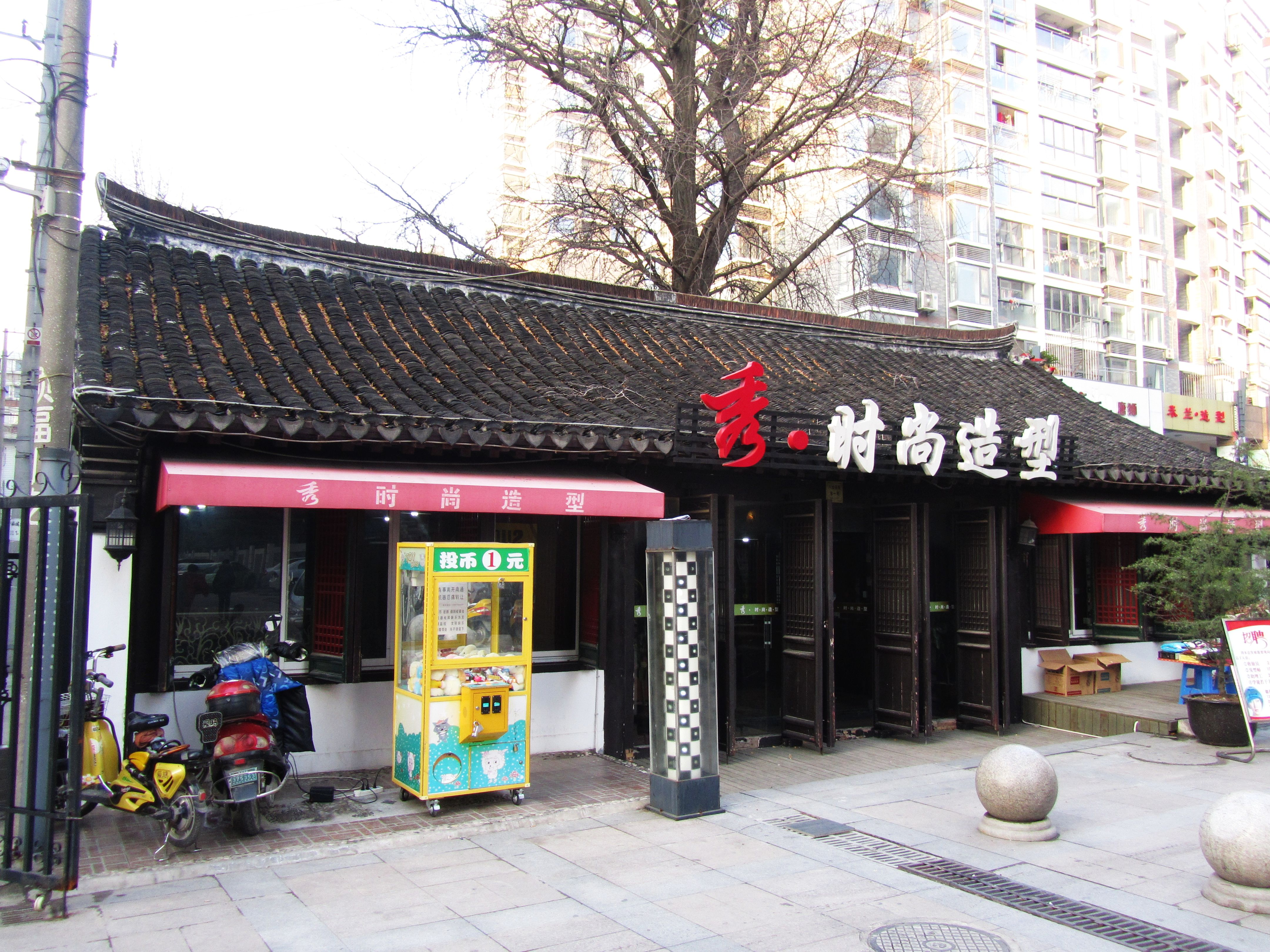 南通丁古角明代住宅，正面。